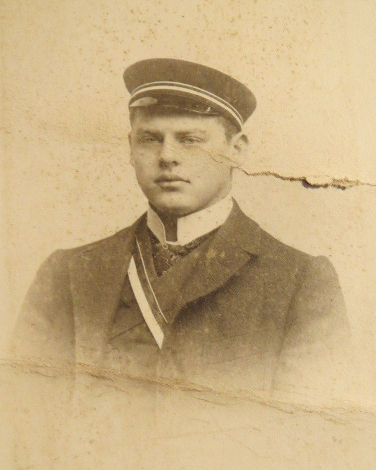 Oswald Artur Hecker - Corps Borussia Tübingen - WS 1900-01; späterer Professor für Neuere Geschichte, Kolonialgeschichte; Dr. phil. habil. Oswald Artur Hecker (* 5. August 1879 in Dresden; + 7. März 1953)